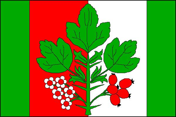 Vlajka obce Hlohovčice